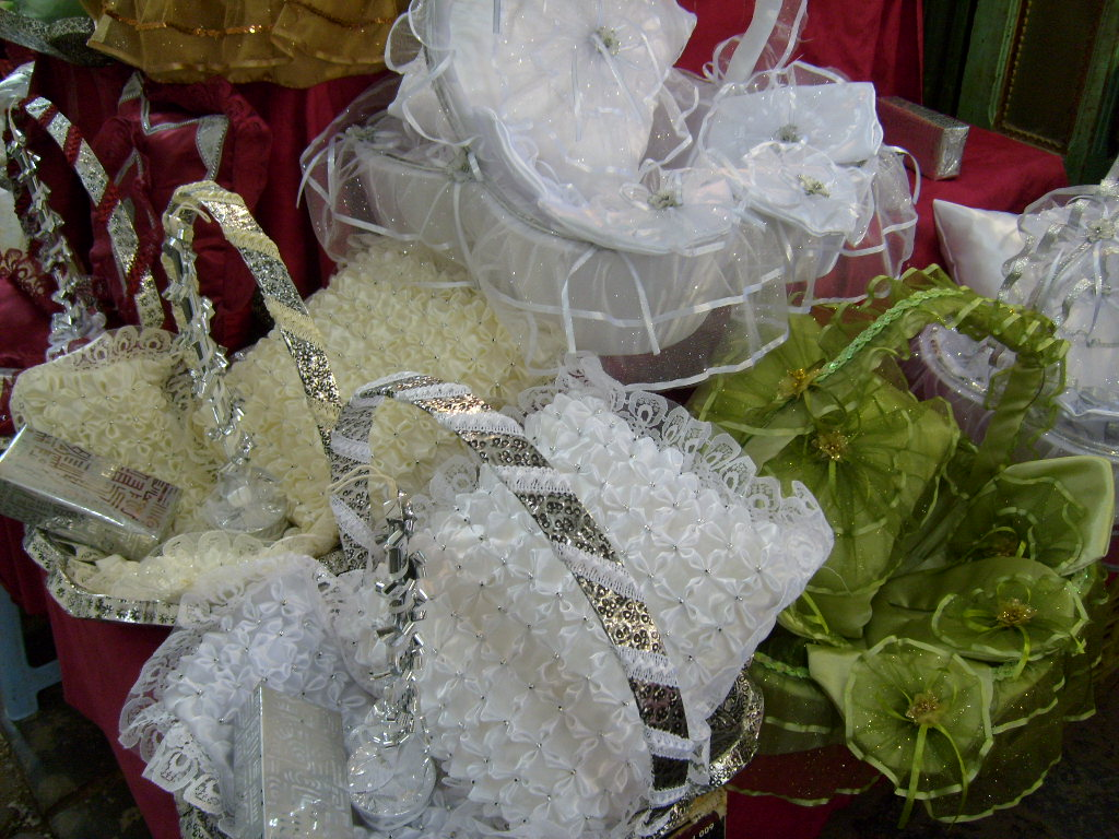 Trousseaux de mariées dans la médina de Tunis